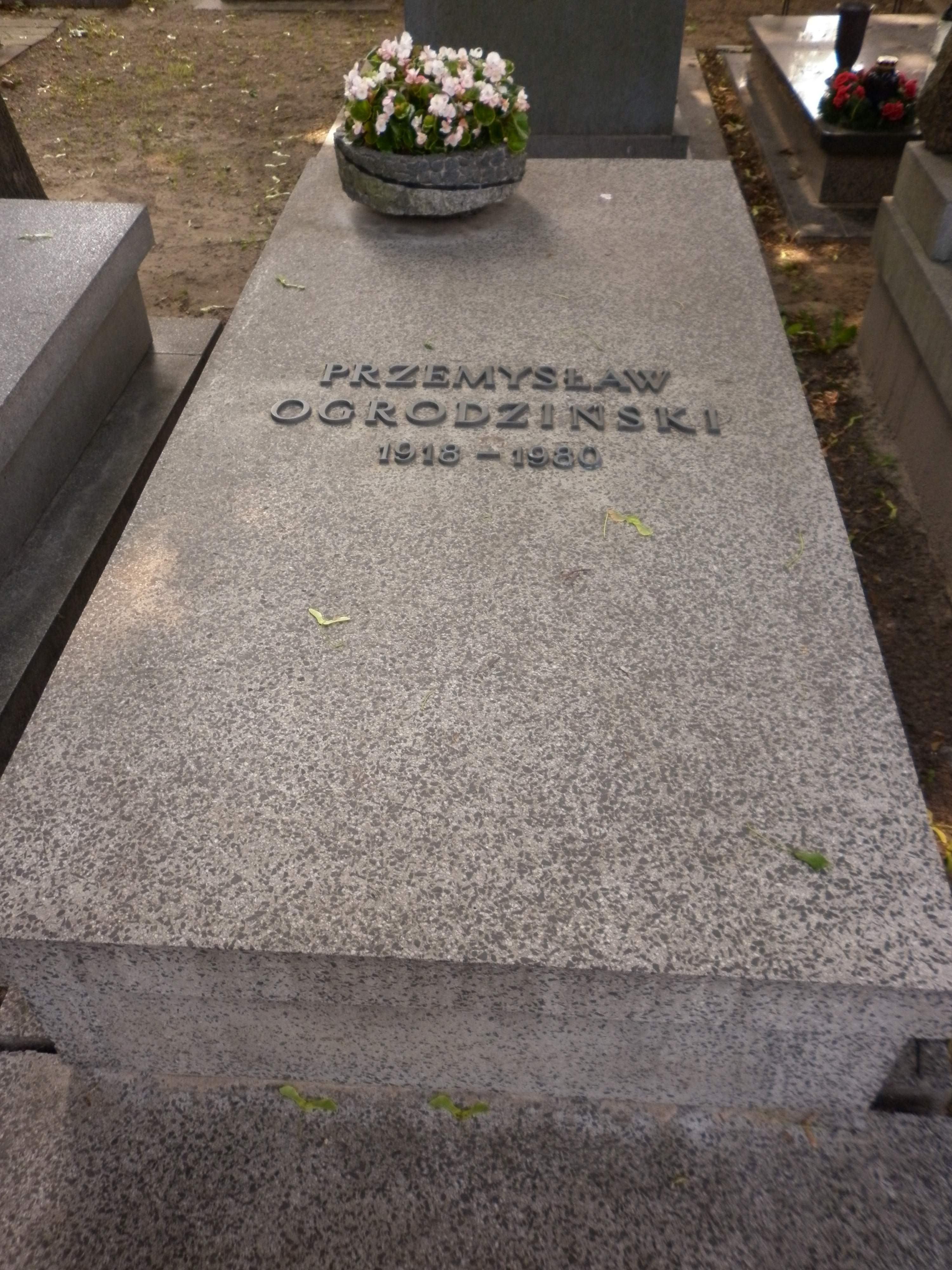 Grób Przemysława Ogrodzińskiego na Cmentarzu Wojskowym na Powązkach